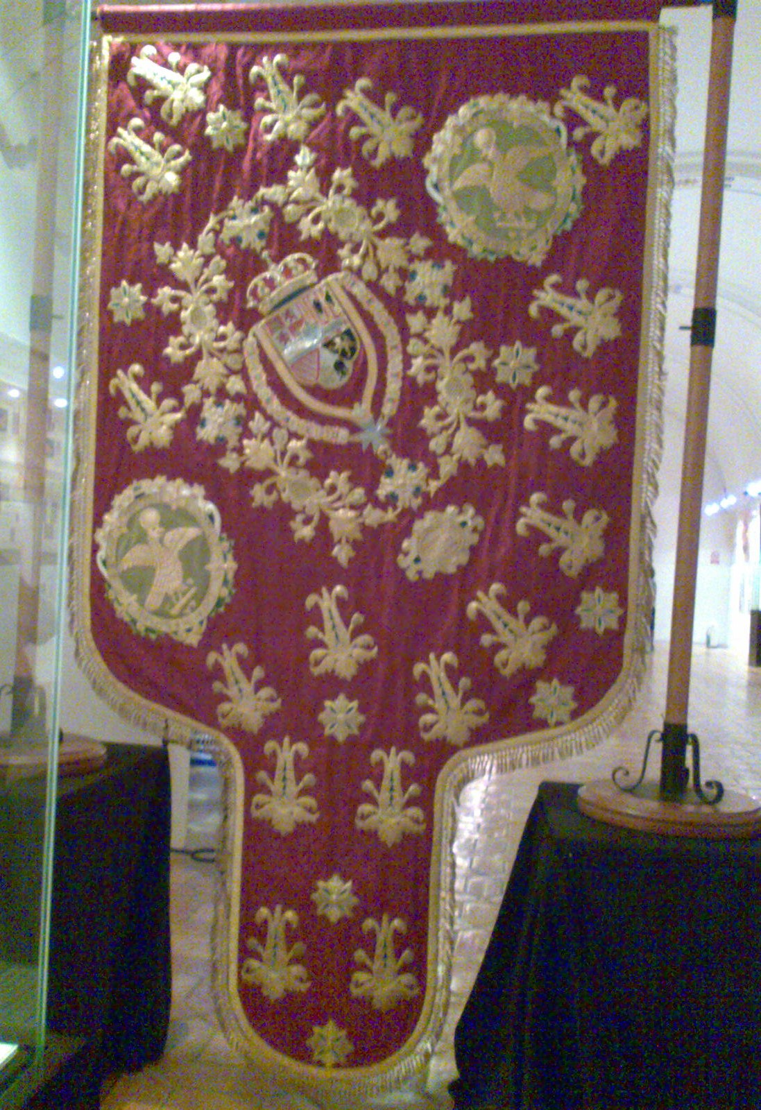 Gloriosa ensenya de l'Oriol (revers), bandera/senyera d'Oriola.